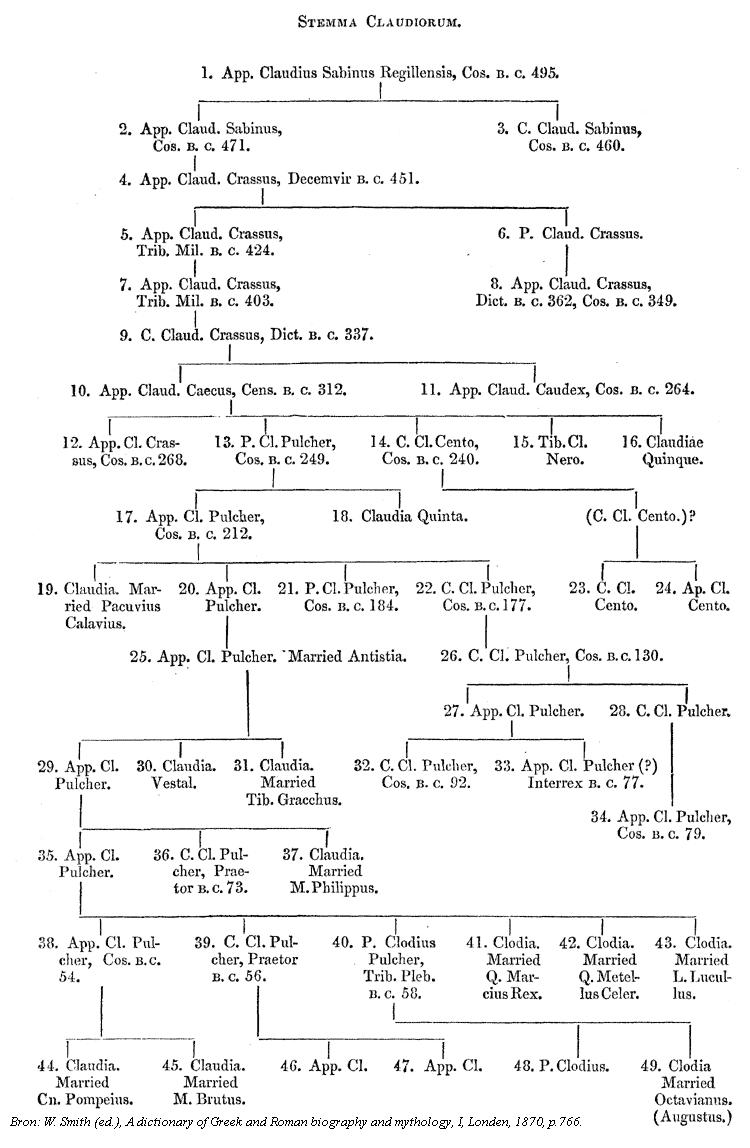 W. Smith (ed.), A dictionary of Greek and Roman biography and mythology, I, Londen, 1870, p. 766.